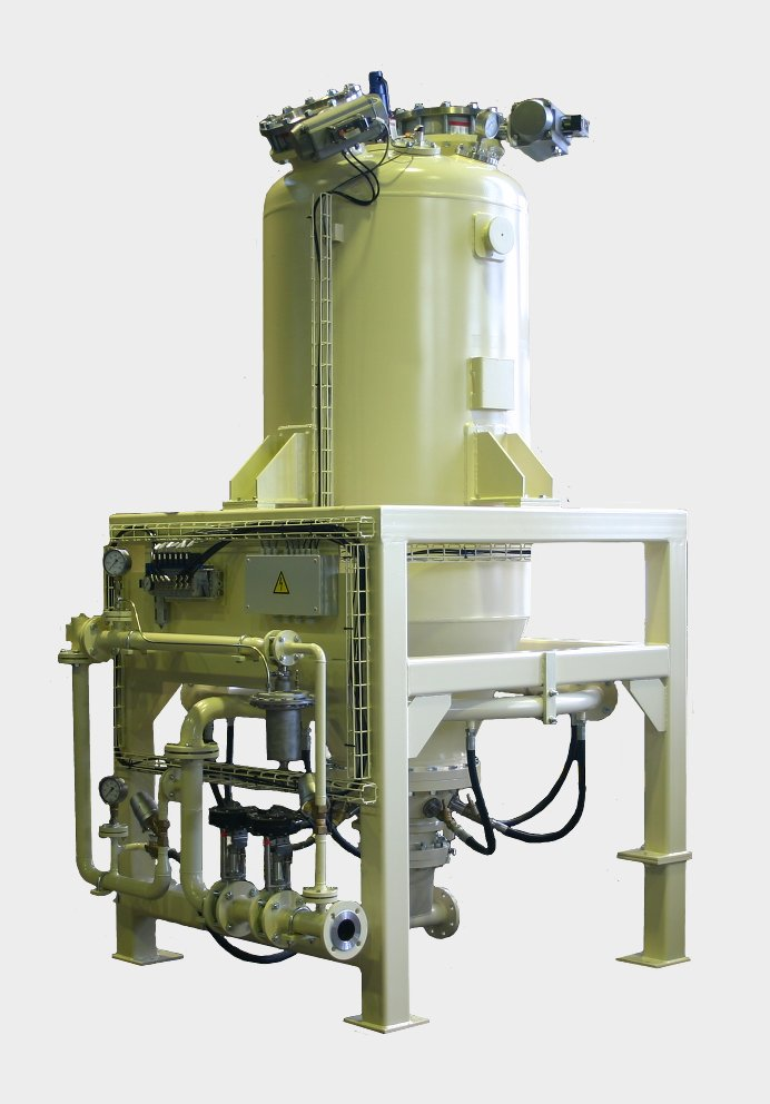 Gasstrahlmischter